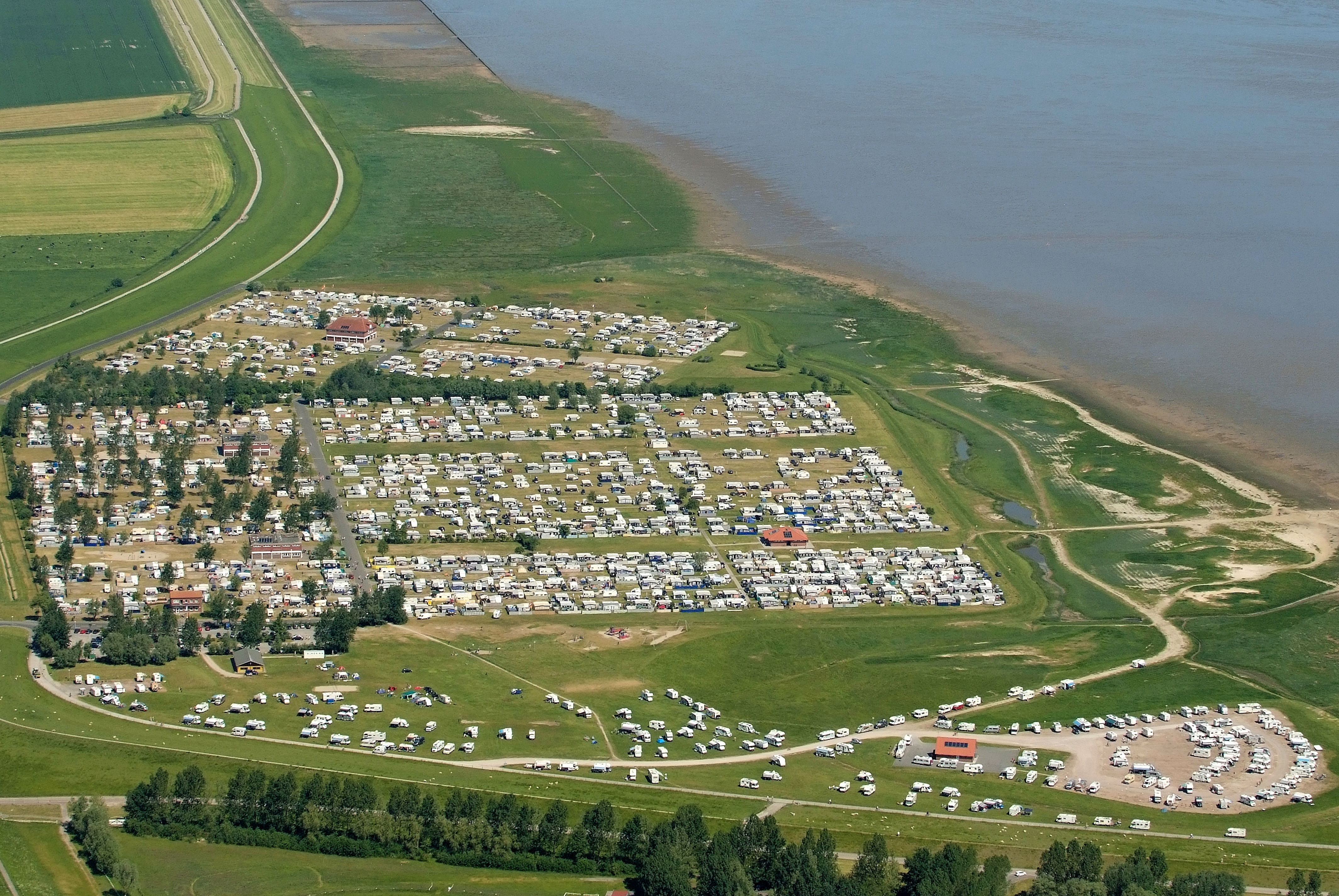 Campingplatz Hooksiel Fotoflug vom Flugplatz Nordholz-Spieka über Cuxhaven und Wilhelmshaven